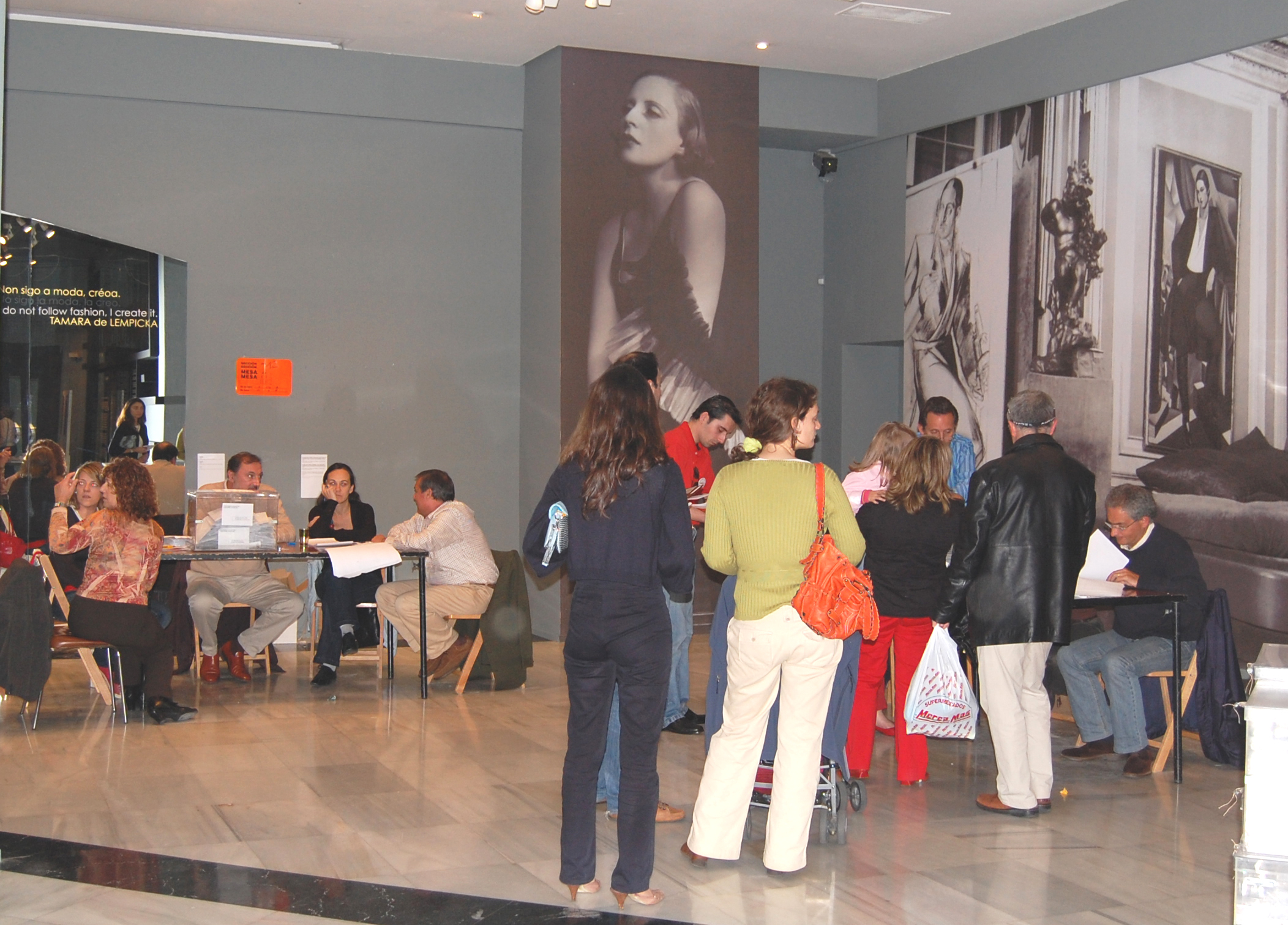 Cidadãos votam nas eleições municipais em Vigo, Galiza. No fundo um retrato da pintora Tamara de Lempicka.